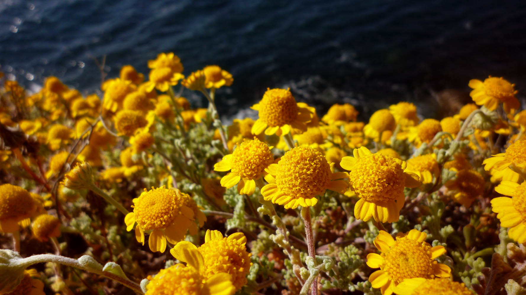 Anthemis chrysantha (Manzanilla de Escombreras), endemismo iberoafricano, en la punta de La Azohía, Cartagena, España.